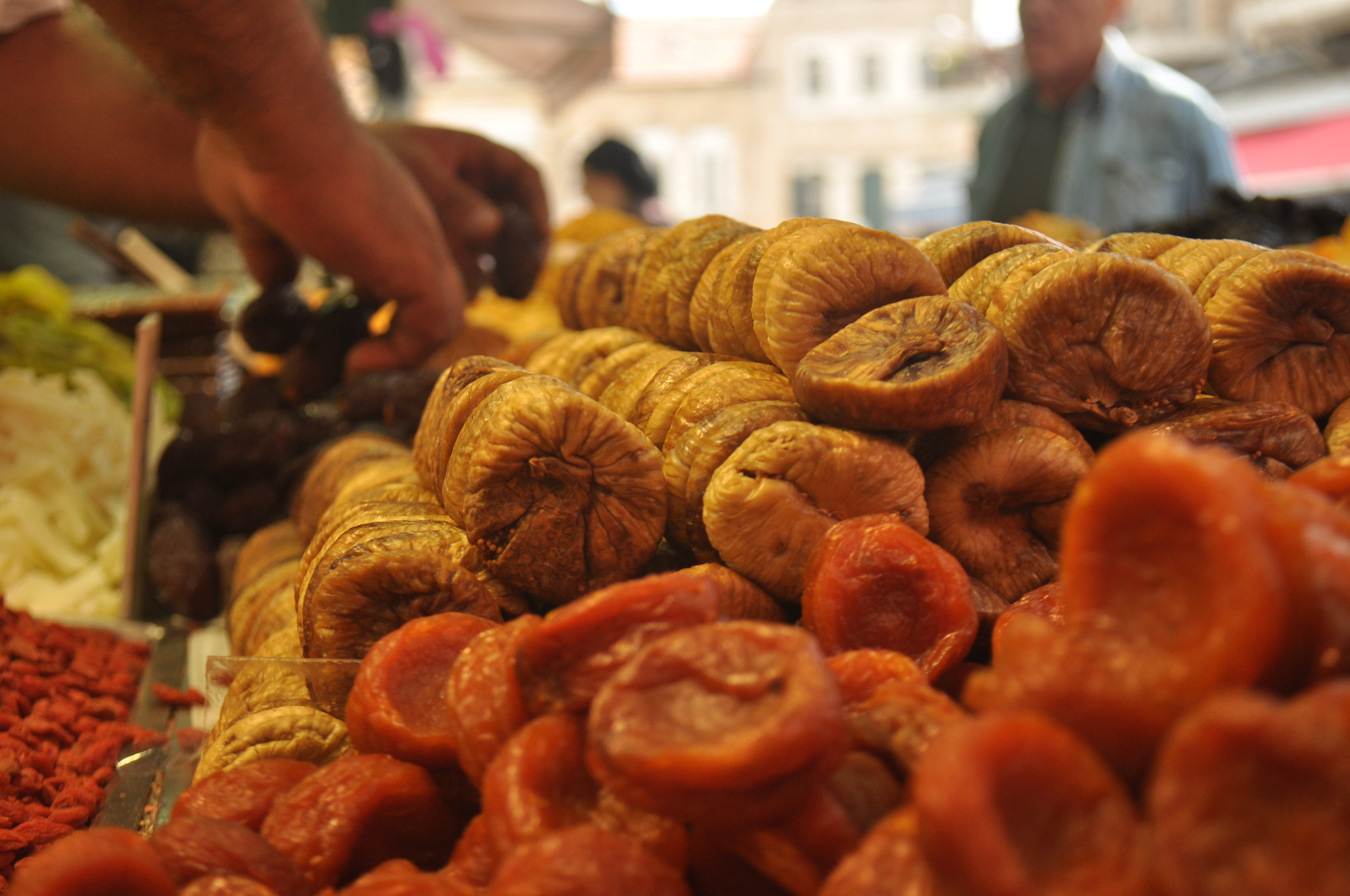 פירות יבשים בשוק מחנה יהודה